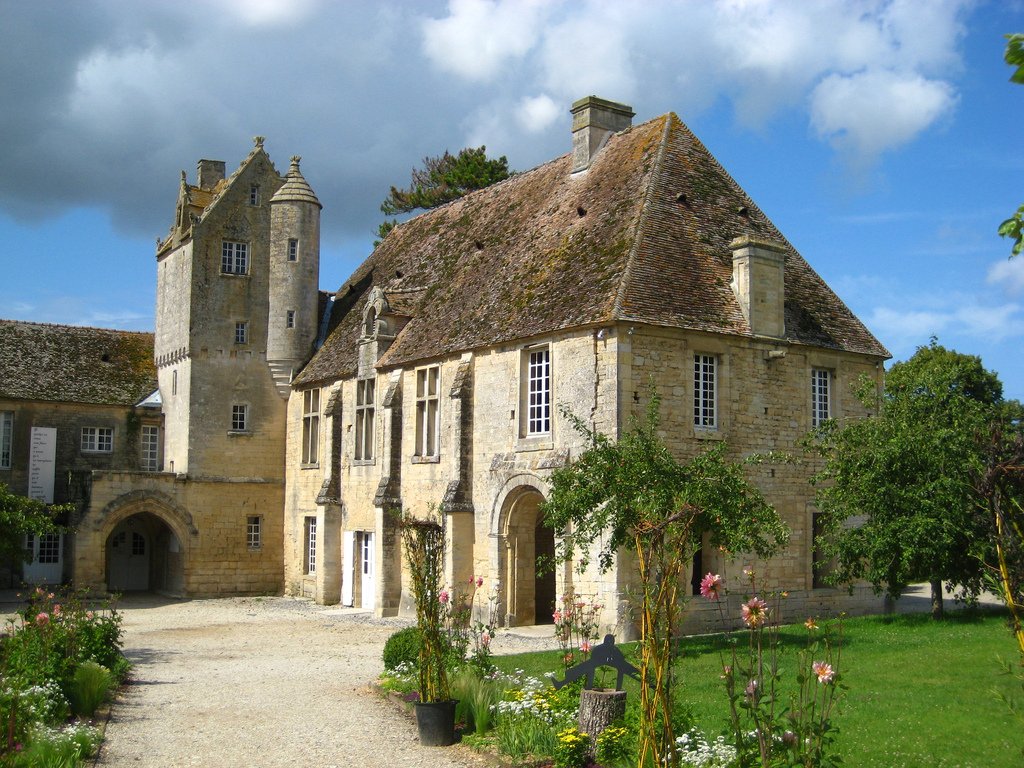 logis seigneurial du prieuré Saint-Gabriel à Saint-Gabriel-Brécy dans le Calvados (Basse-Normandie, France).